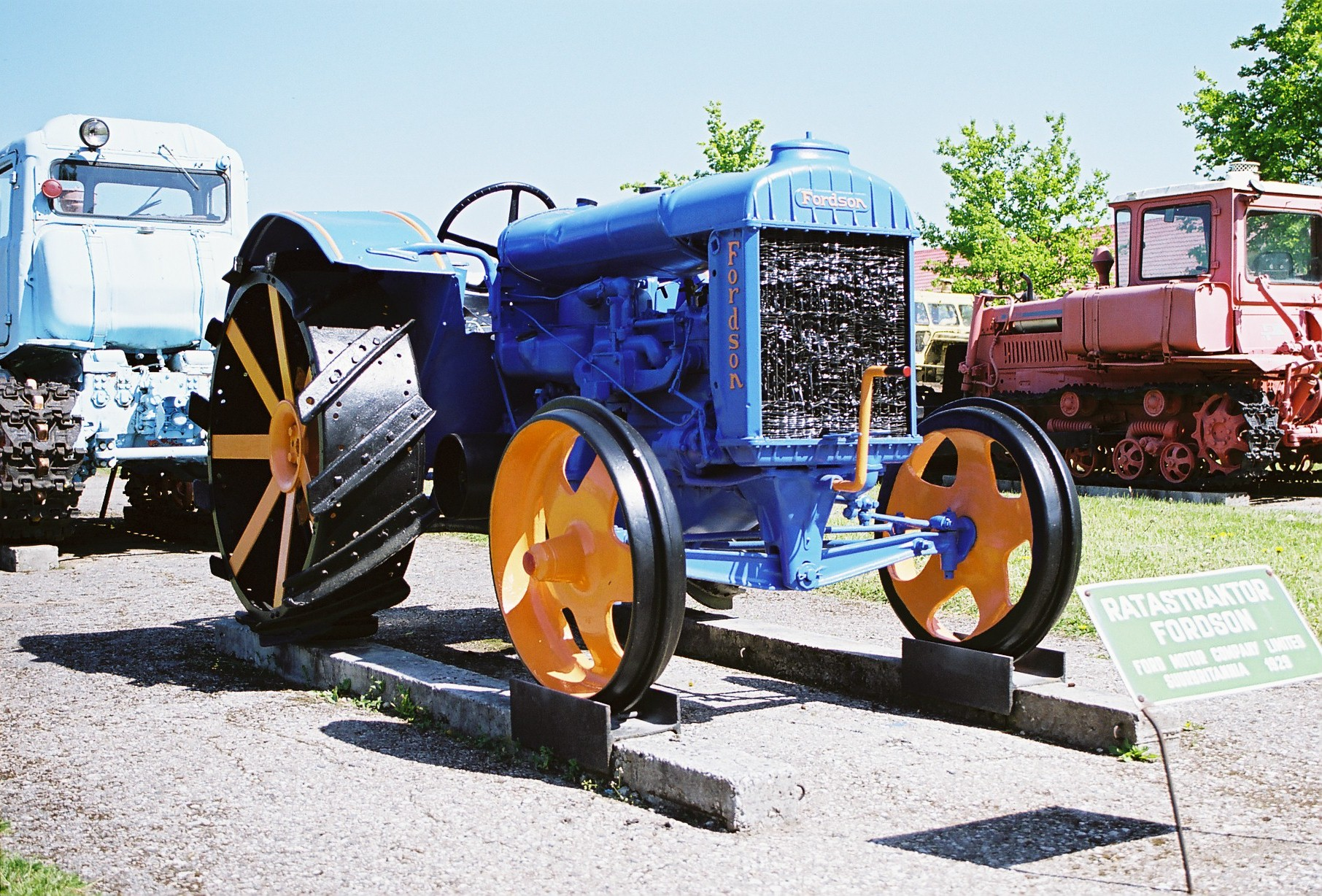 Ratastraktor Fordson, Ford Motor Company Ltd, 1929